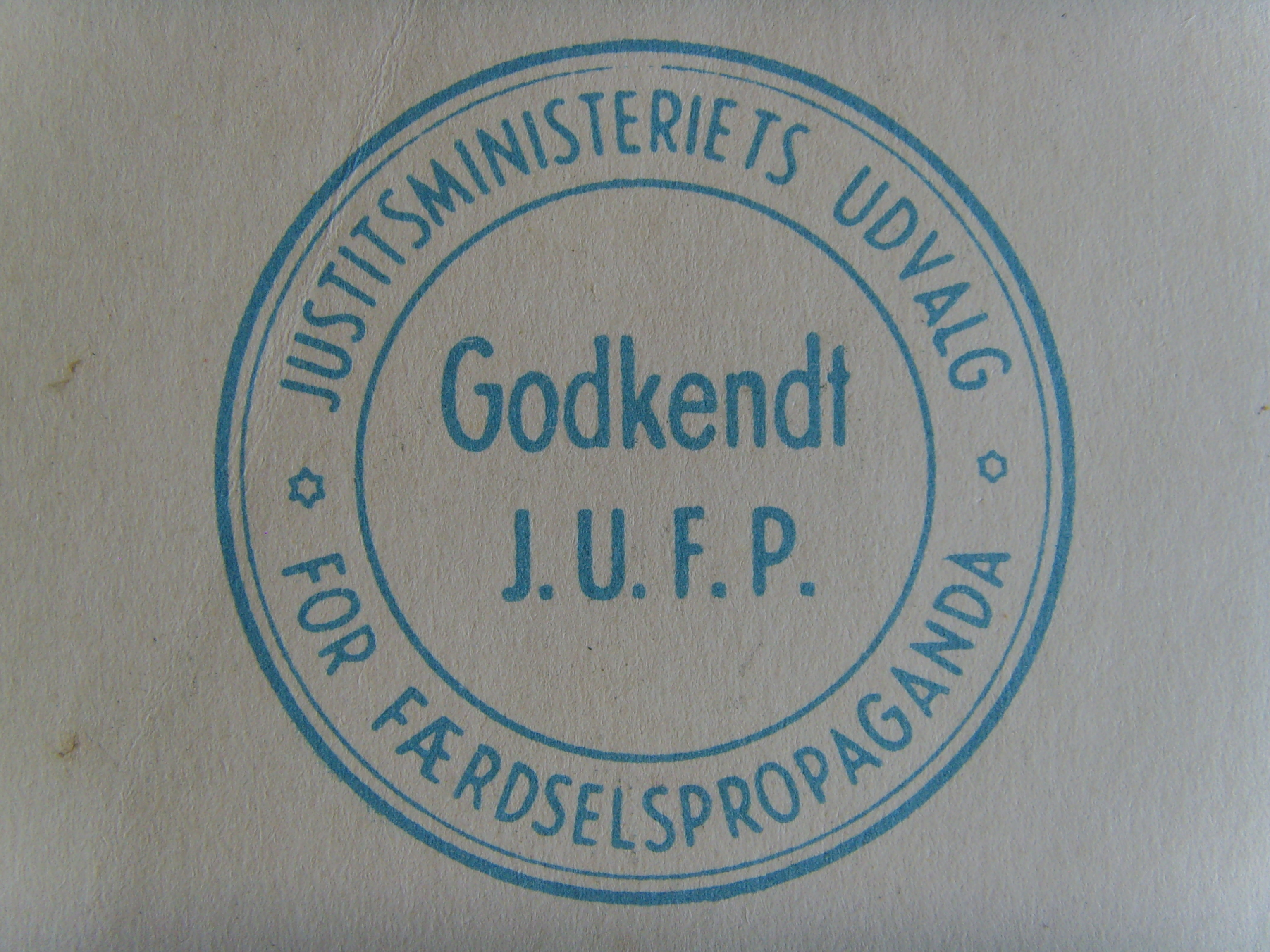 Justistministeriets Udvalg For Færdselspropaganda brugte dette stempel i godkendt informationsmateriale om trafik. Stemplet er fotograferet fra Arne Ungermann's børnebog om færdsel fra 1933.